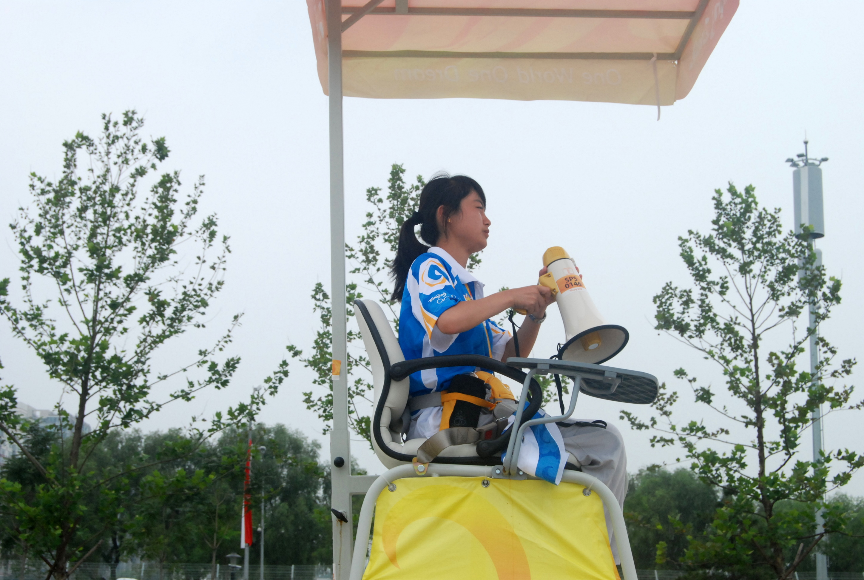 2008奥运会志愿者，在北京奥林匹克公园射箭场